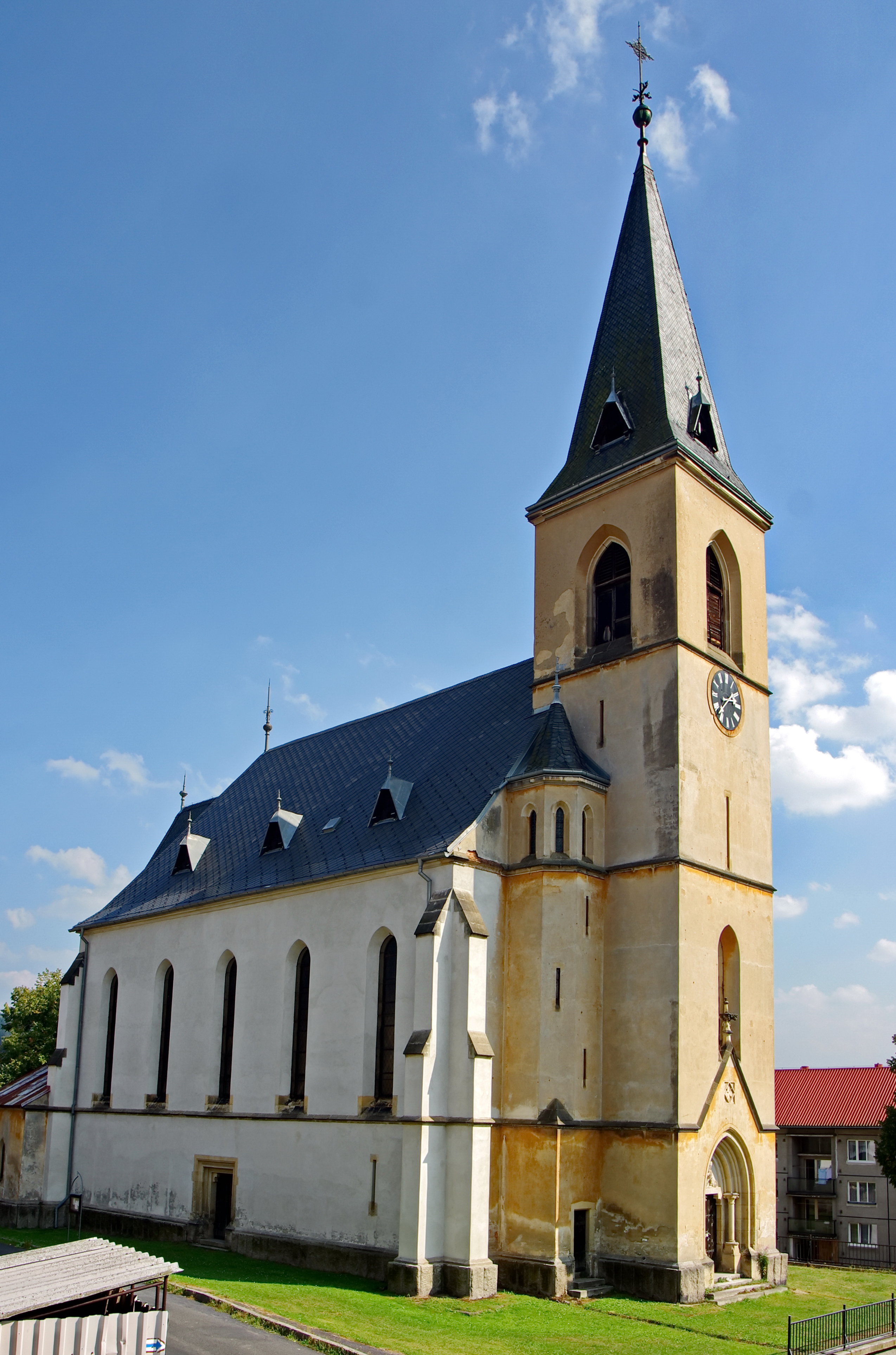 Kostel svatého Michaela archanděla, Horní Oloví.